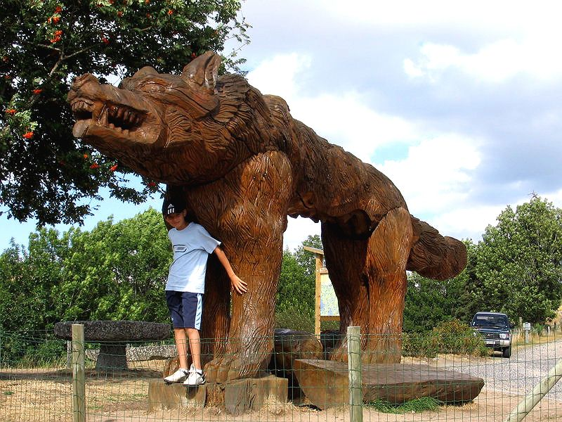 Auteur Gilou42 Modification graphiques ; Siren - (discuter) 3 février 2006 à 09:43 (CET)